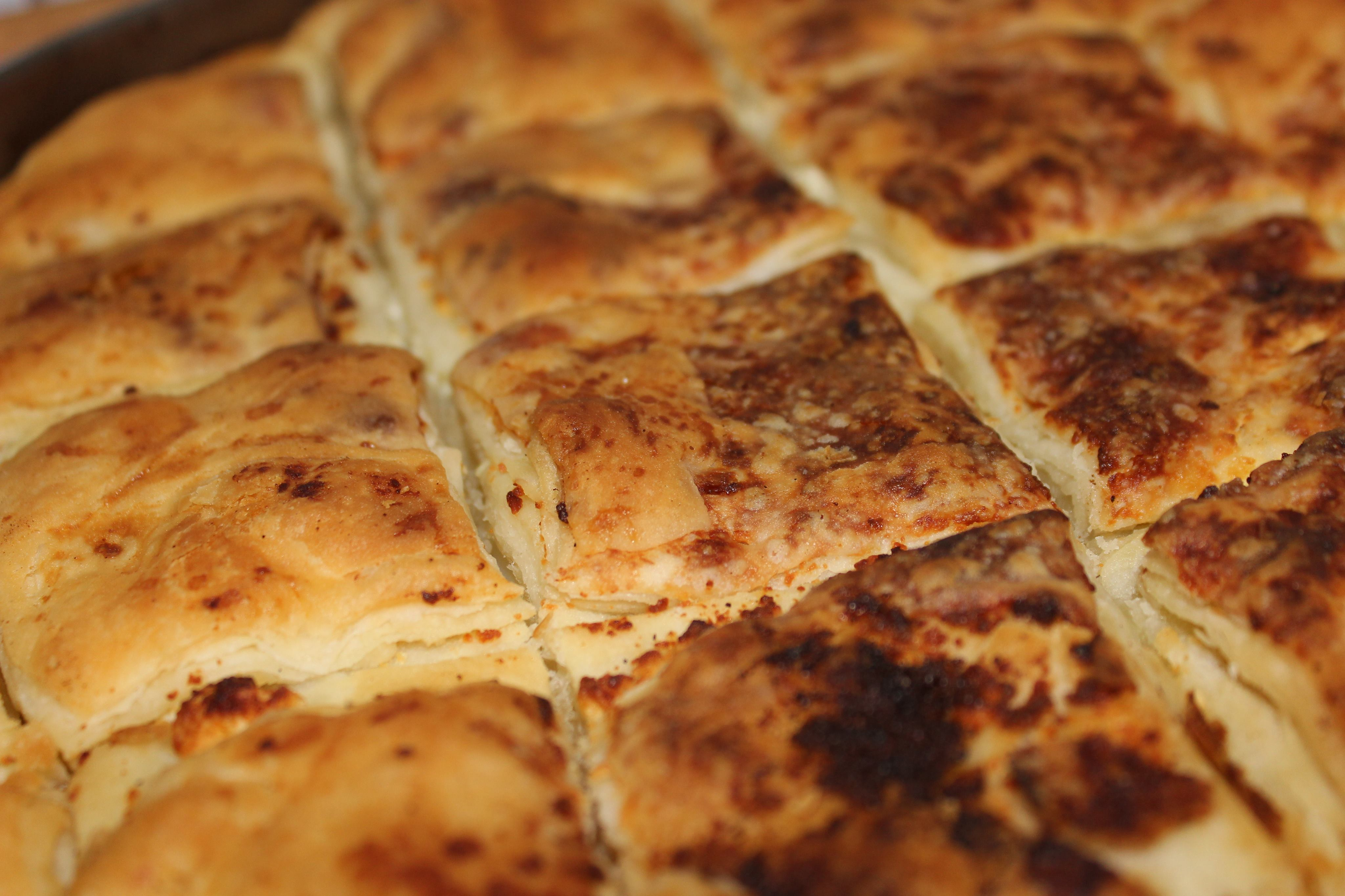 Сеченица(путер,урда)